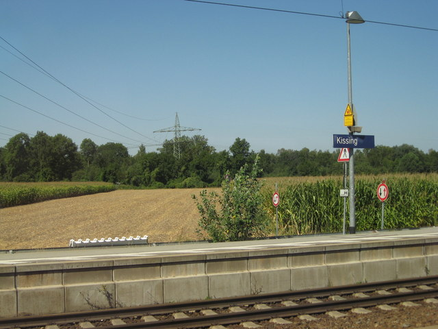 Felder bei Kissing Bahnhof